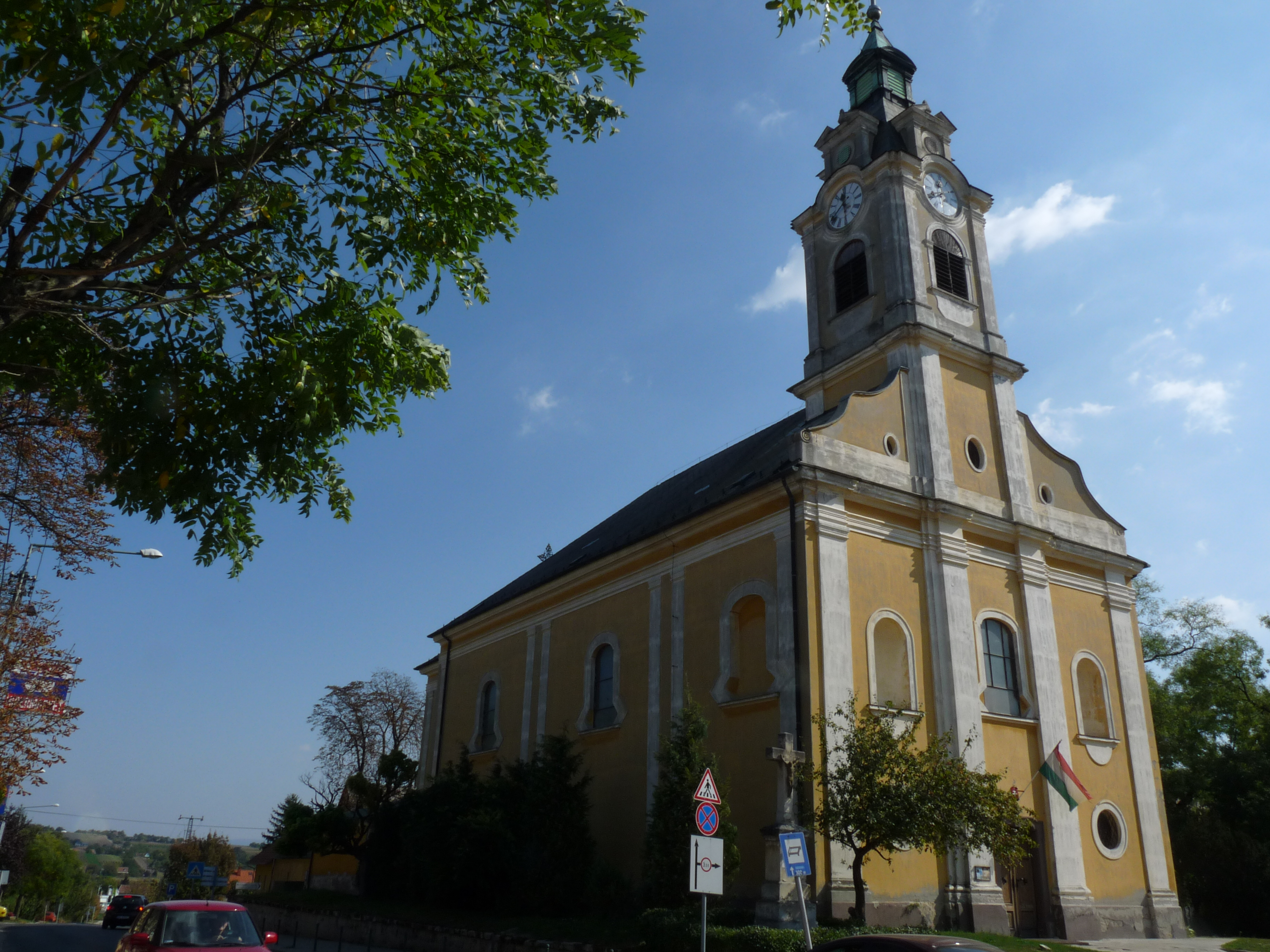 Szentháromság római katolikus templom (Bicske, Hősök tere)